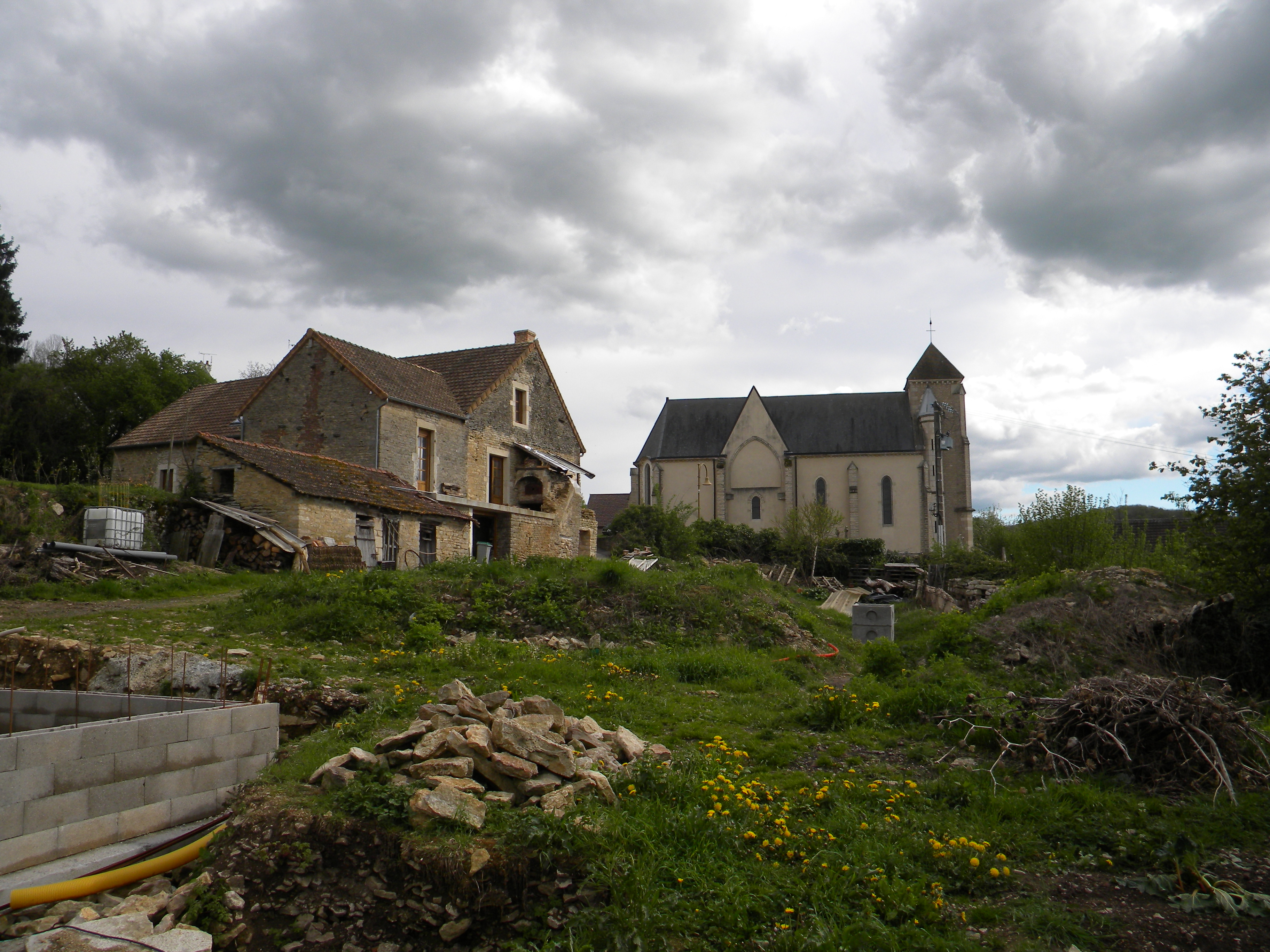 Chaudenay-la-Ville